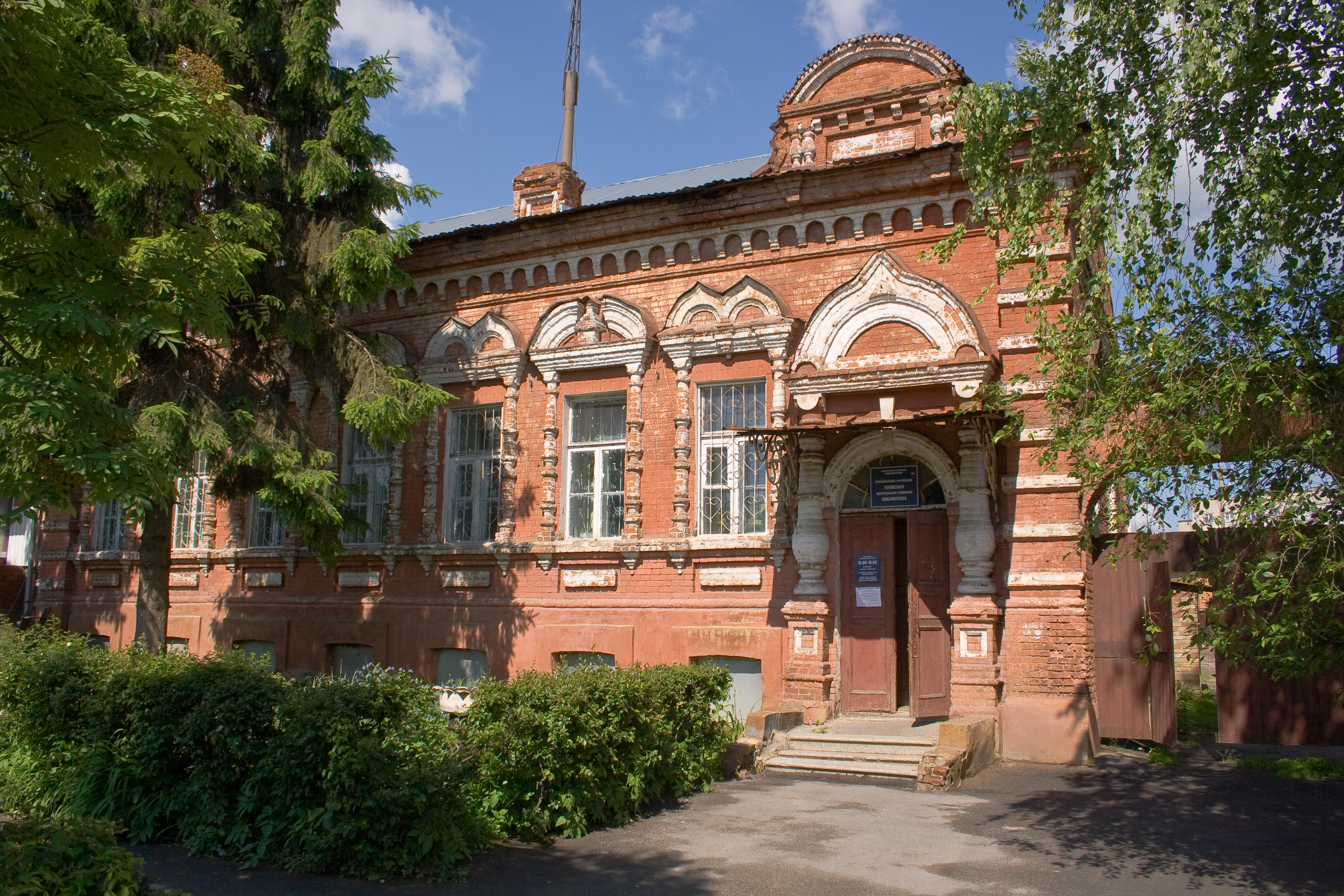 «Дом Синявина с колбасной, 1880-е г.» город Плавск, ул. Коммунаров, 62